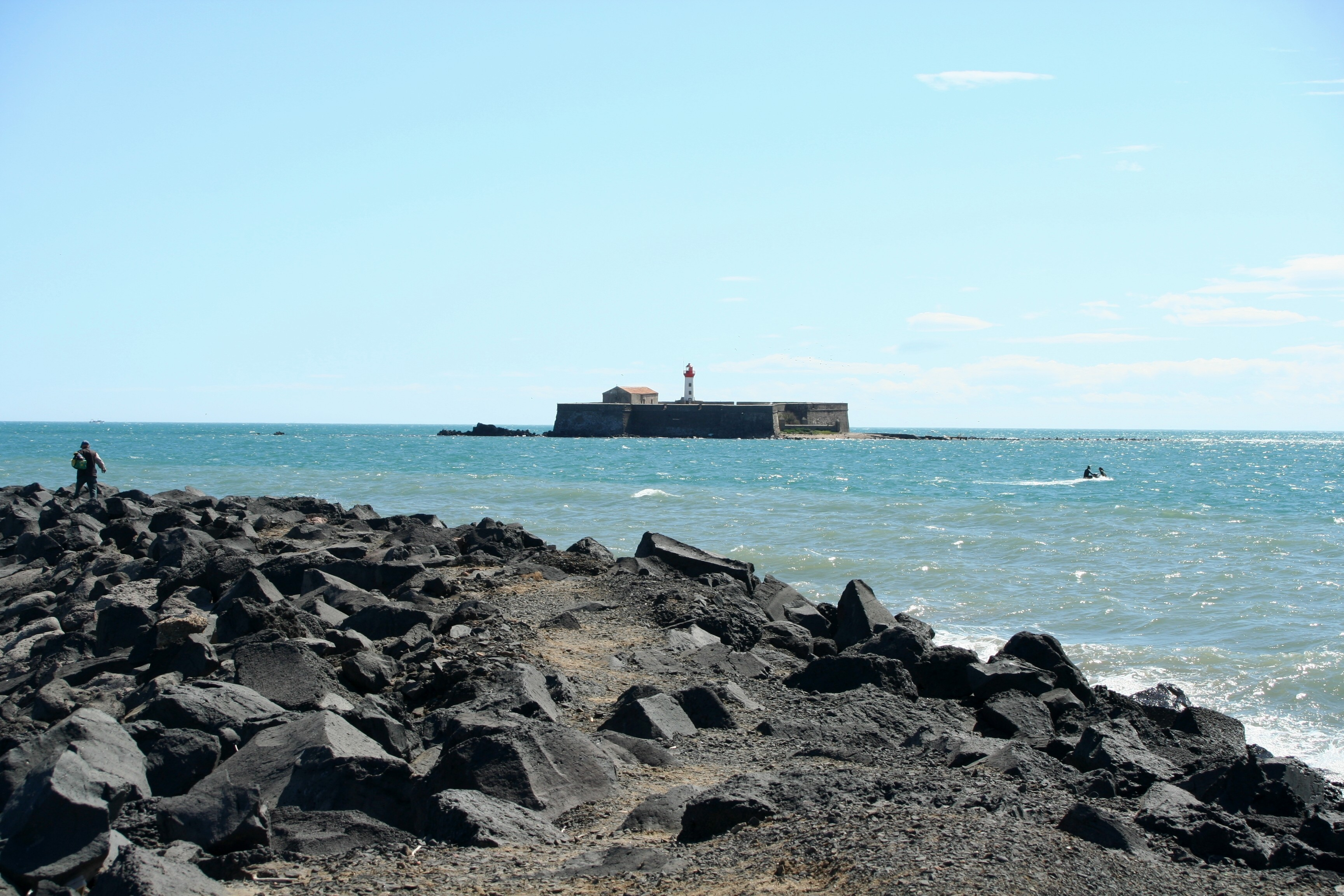 Îlot de Brescou vu de la jetée du Cap-d'Agde, Hérault